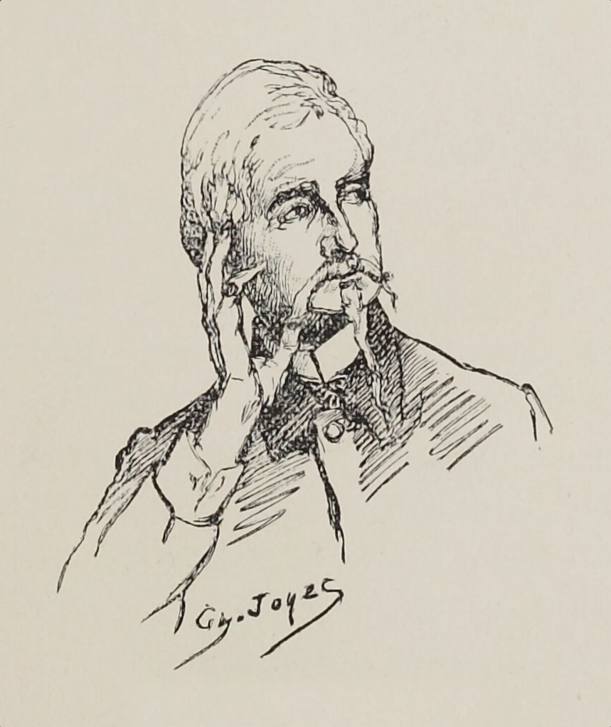 Henry Russell, par Charles Jouas. Vignette de couverture, tome III de "Cent Ans aux Pyrénées", de Henri Beraldi.